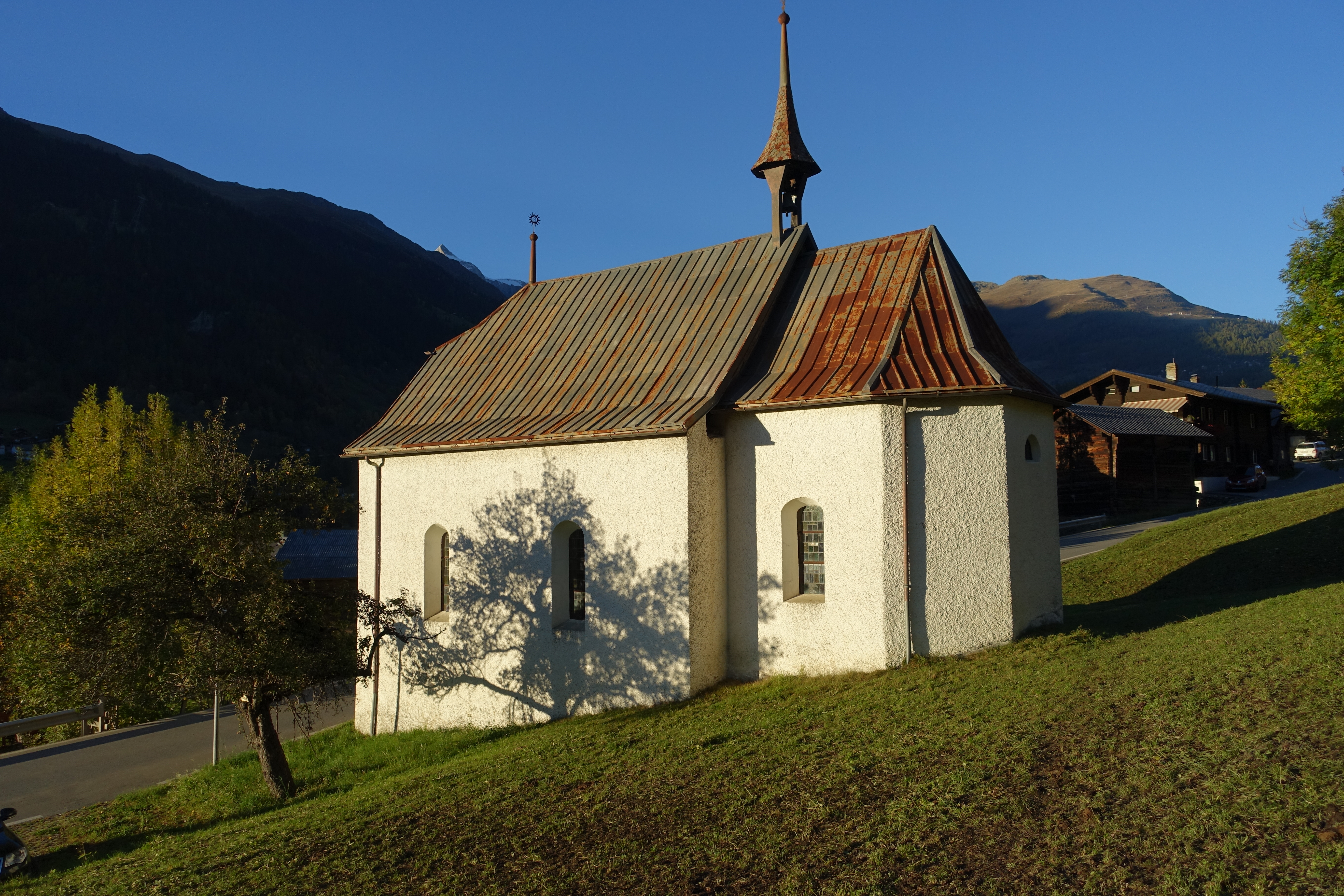 Kapelle St.Antonius (1684)